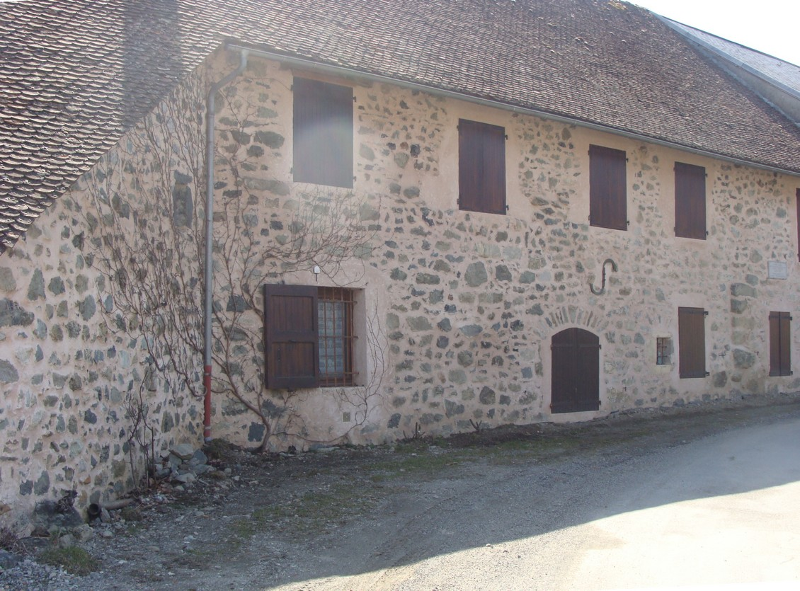 Maison natale du spéléologue David Martin, à Lallée, commune de Saint-Jacques-en-Valgaudemard (Hautes-Alpes).